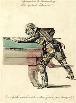 Theodor Alconiere Ein Spieler aus allen bekannten Spielen zusammengesetzt. Handkolorierter Kupferstich, gestochen von Andreas Geiger. Um 1840. Plattengröße 22 x 16 cm.